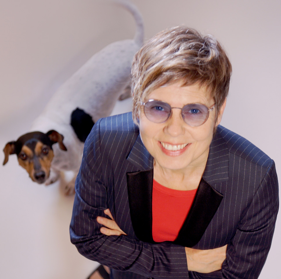 Susanne Müller 2017 mit Hund